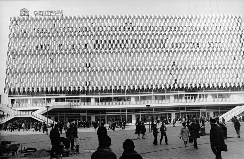 Berlin, Alexanderplatz, "Centrum"-Warenhaus Zentralbild Deutsche Demokratische Republik 22.2.71-ro Einkaufsbummel im neuen Berliner Warenhaus Das "Centrum" am Alexanderplatz in Berlin, das größte Warenhaus der DDR, wurde den Hauptstädtern am 25.11.70 als zentrale Einkaufsstätte übergeben. Reporter: Link Copyright: ADN-Zentralbild (Bitte beachten Sie unseren Begleittext)